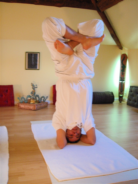 Yoga postures Padma-shirshasana